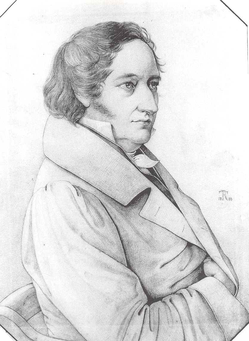 Christian Gerhard Overbeck (1784–1846), Oberappellationsrat, Direktor der Gesellschaft zur Beförderung gemeinnütziger Tätigkeit